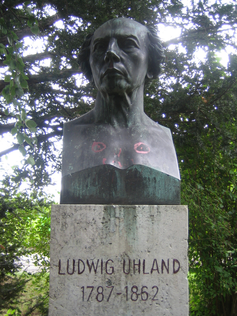 Uhlandsbüste von Ernst Rau (1865) in Stuttgarter Liederhalle. Seit 1955 steht sie auf der Uhlandshöhe.